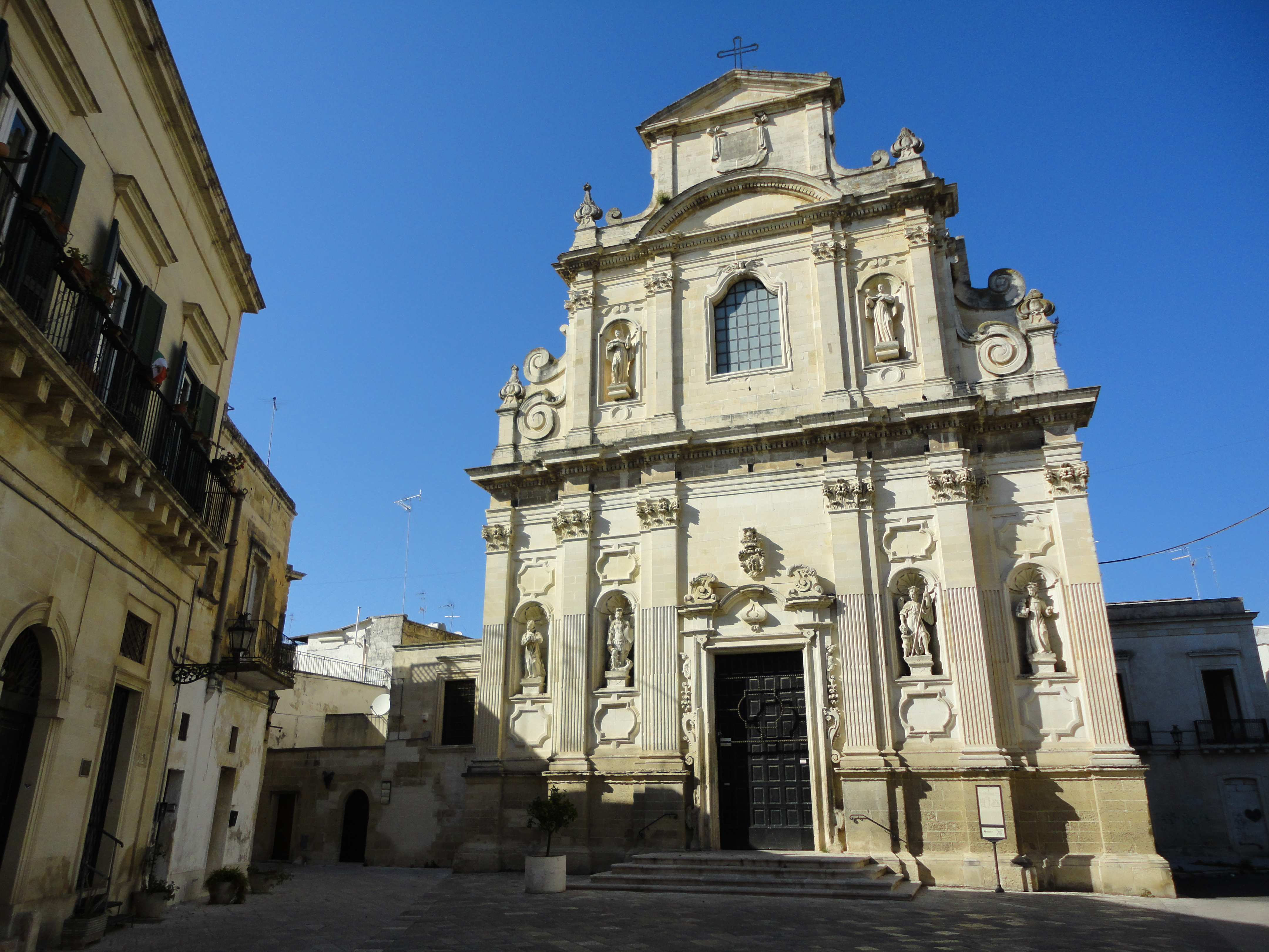 Chiesa delle Alcantarine o Santa Maria della Provvidenza Lecce